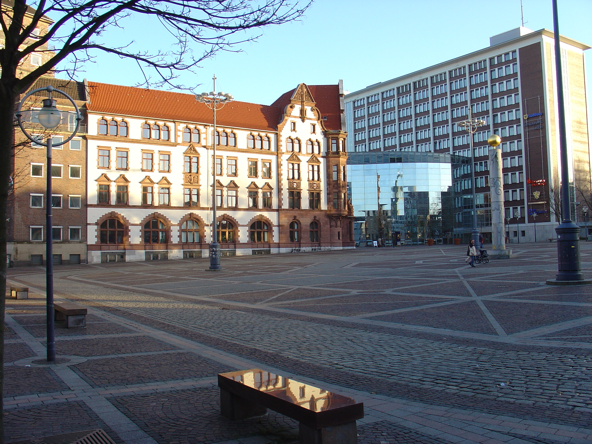 Friedensplatz in Dortmund mit altem und mittlerem Stadthaus